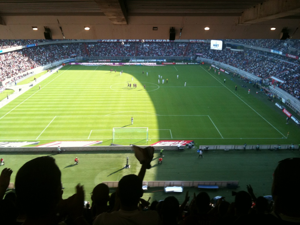 Paris SG - Valenciennes